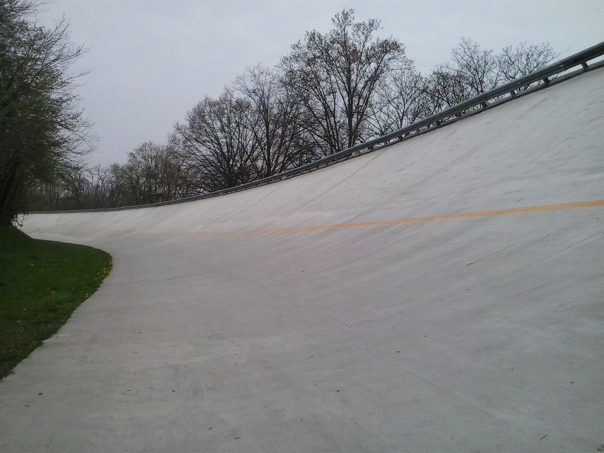 Sopraelevata dell'Autodromo nazionale di Monza